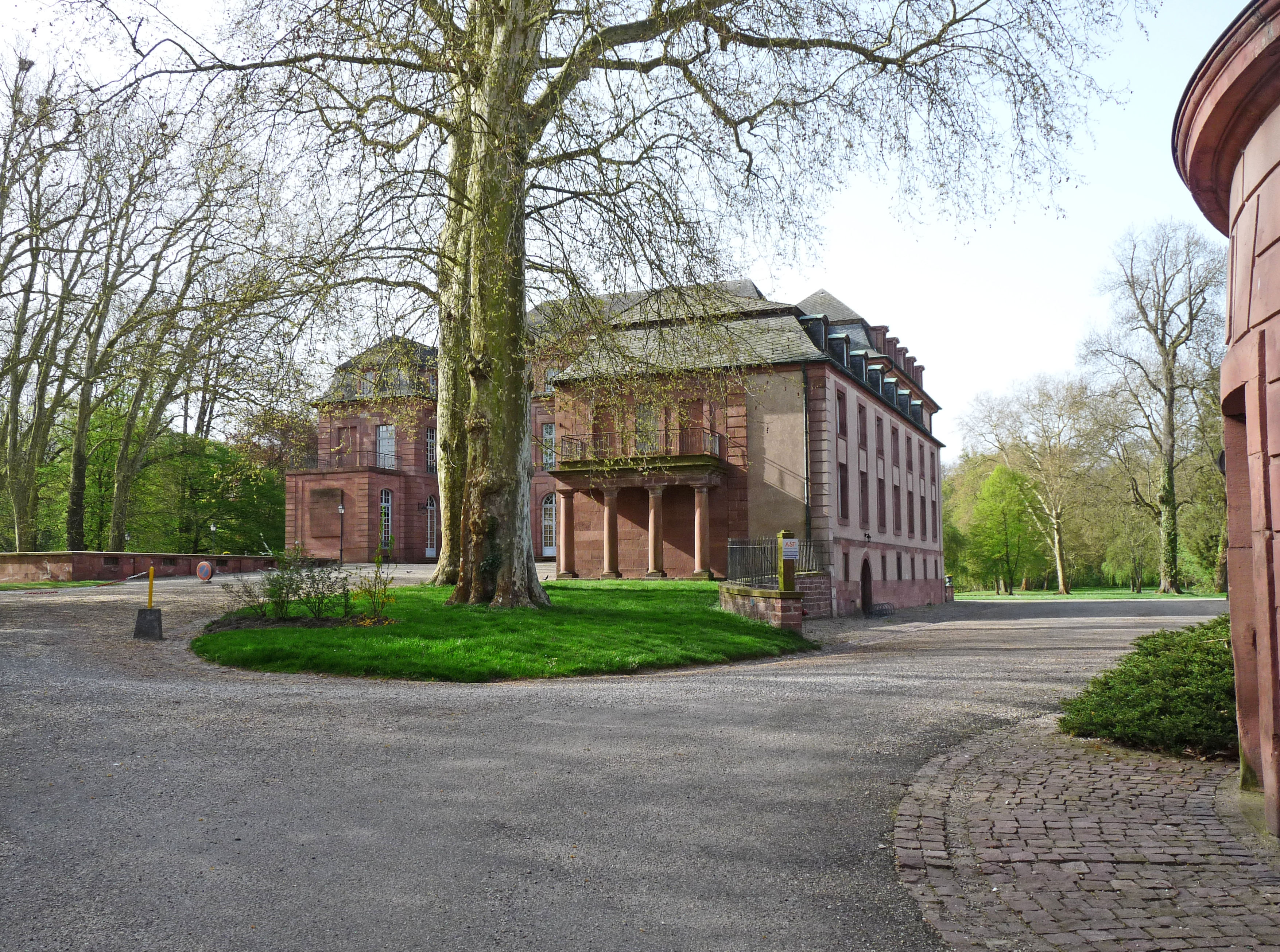 Château De Dietrich à Reichshoffen (Bas-Rhin). Classé Monument historique en 1940.